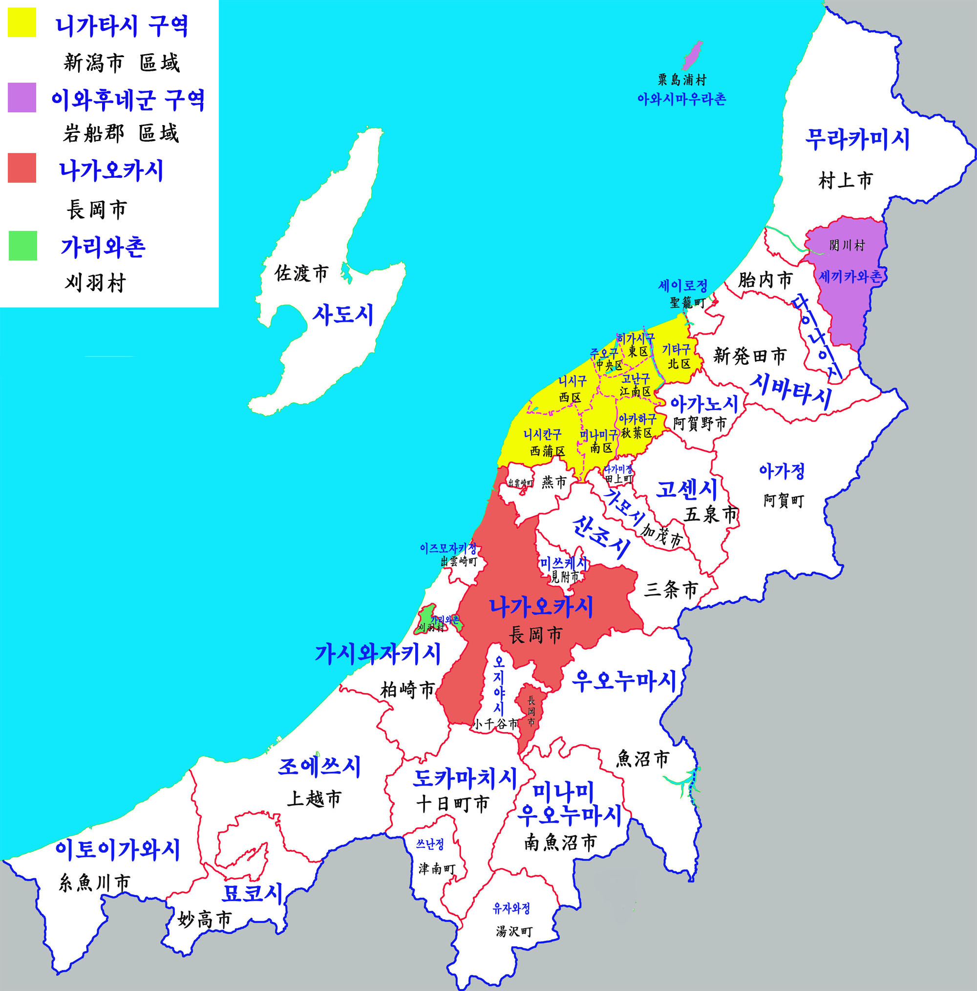 니가타현 행정구역